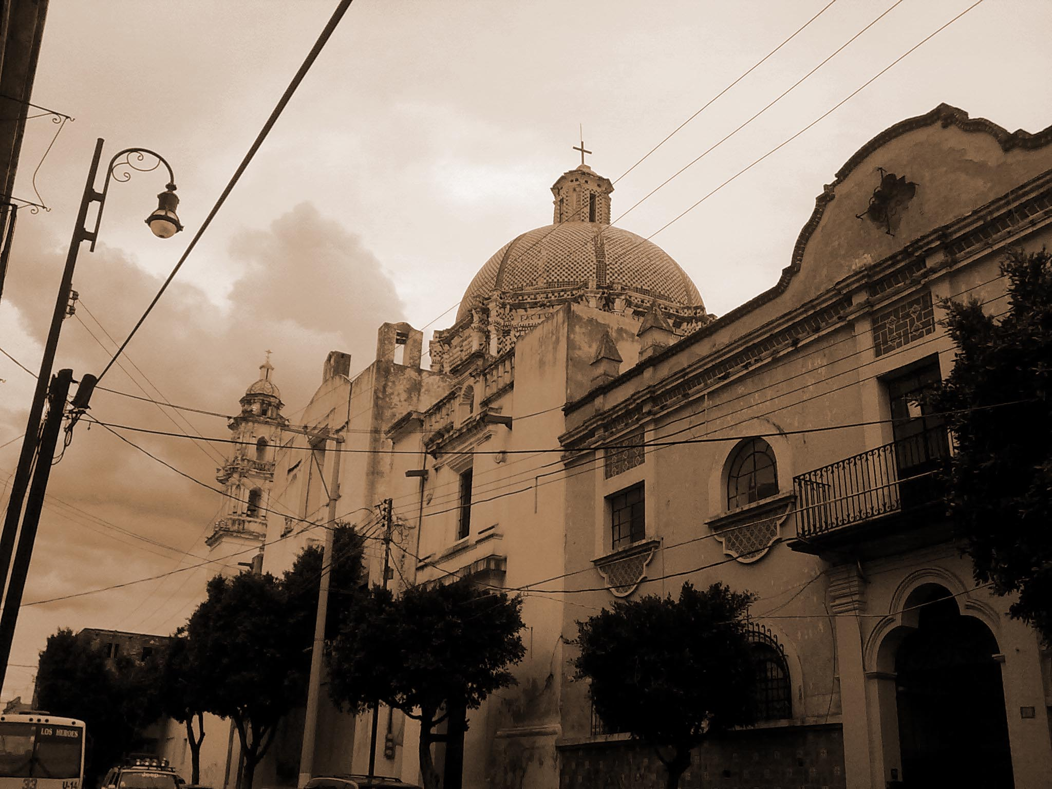 El Carmen, Puebla, Pue., Mexico